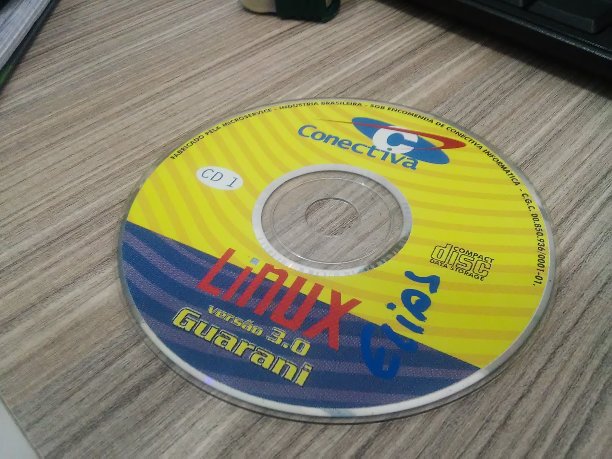 CD de instalação do Conectiva Linux Guarani 3.0, lançado em 1998.